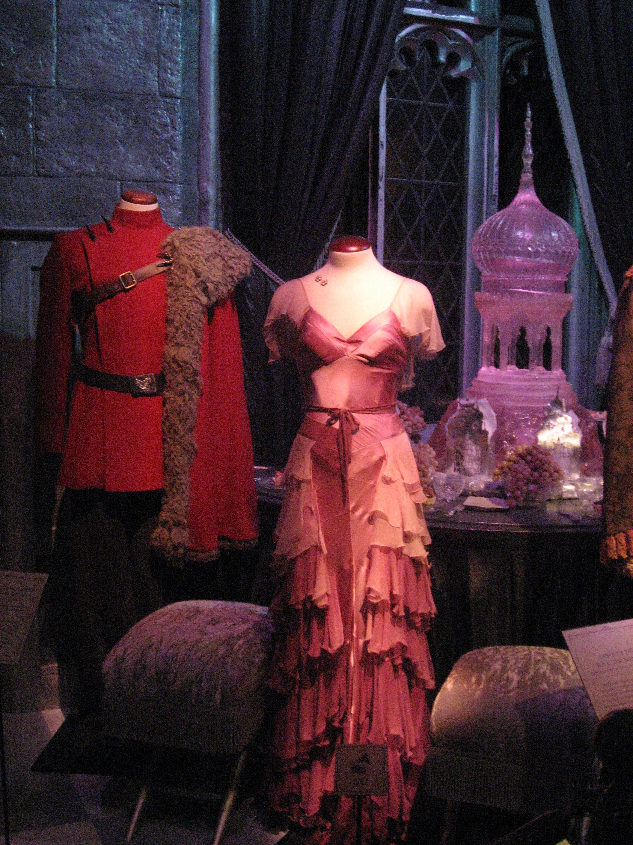 Tenues d'Hermione et de Victor Krum, bal de Noël, Harry Potter Exhibition, Cité du Cinéma, Saint Denis (Paris) avril 2015